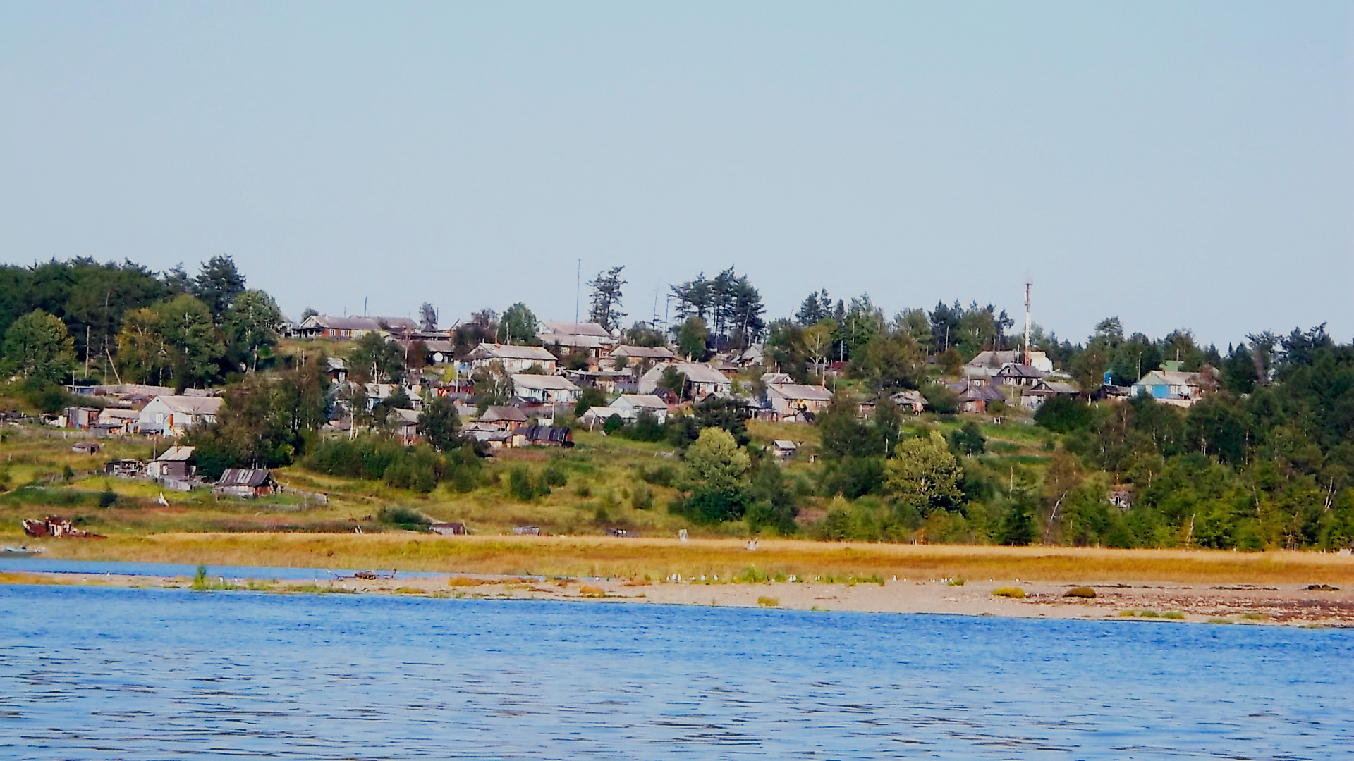 Снимок села Тугур со стороны Тугурского залива.